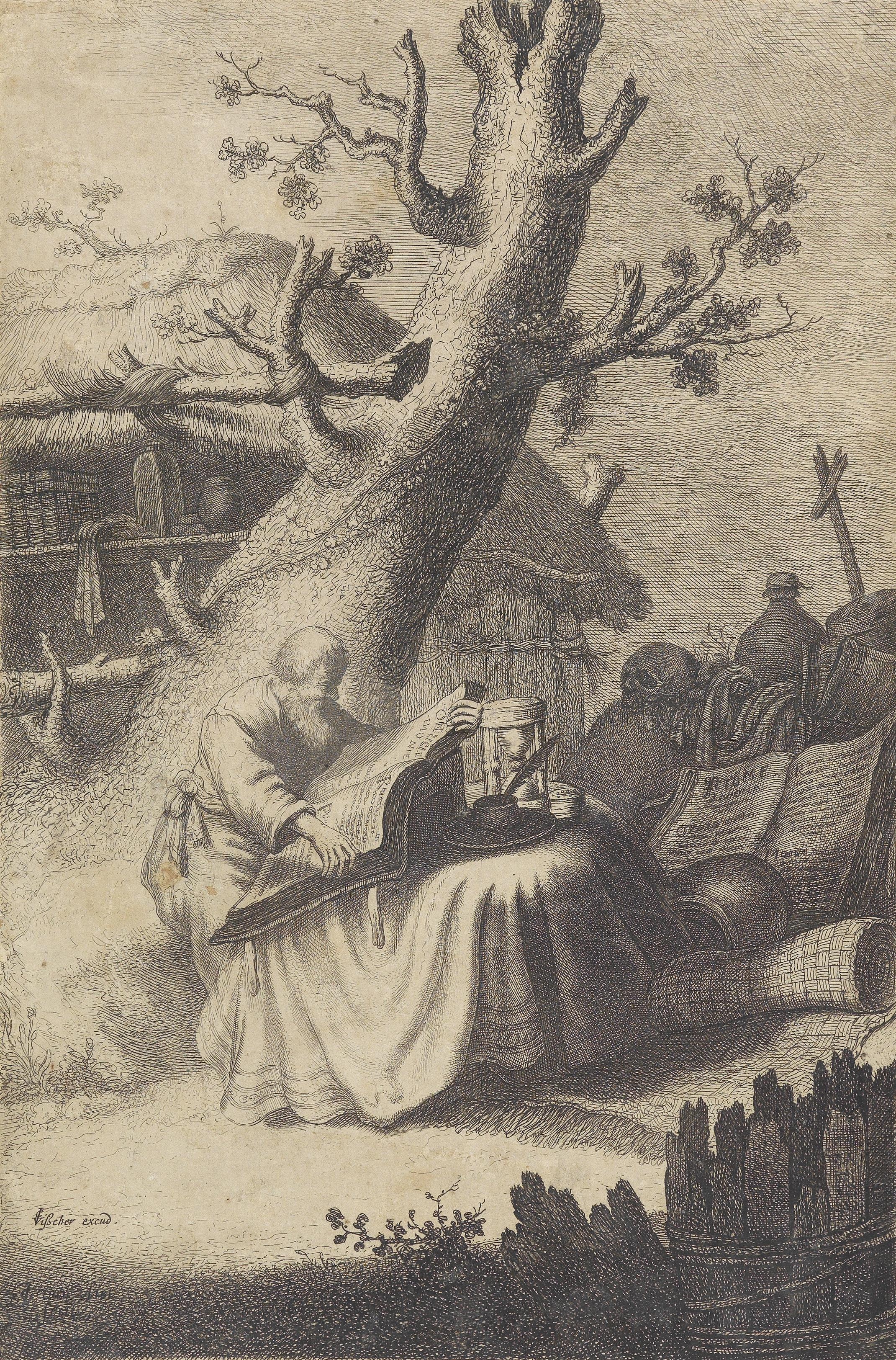 Der lesende Eremit. Radierung mit Kaltnadel, um 1632-34, in der Platte bzeichnet "Vißscher excud.", 33 x 21,6 cm